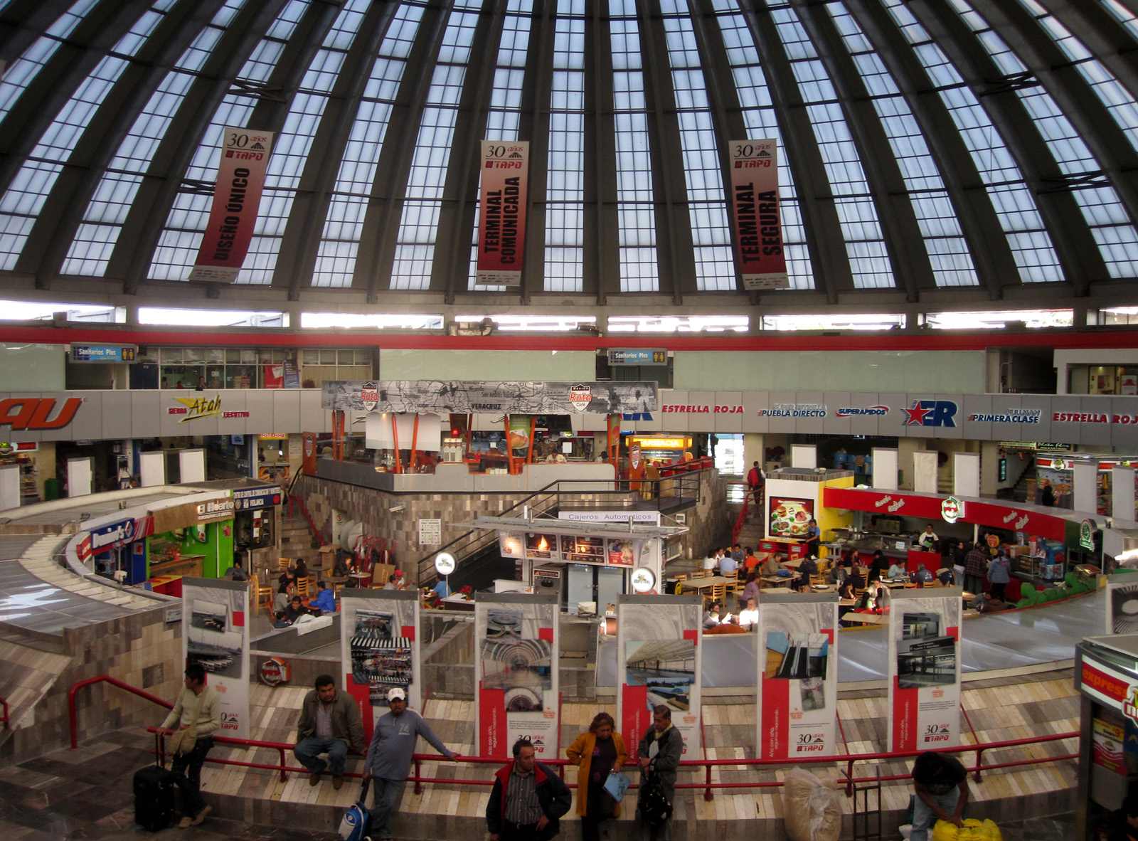 Hovedhallen i bussterminalen TAPO i Mexico by